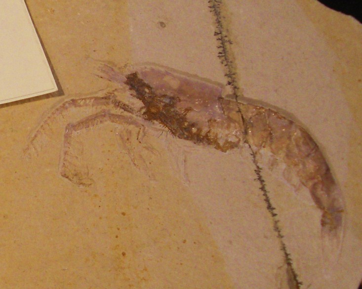 Fossil of Acanthochirana, an extinct crustacean- Took the photo at Fossil Show, Munchen 2011